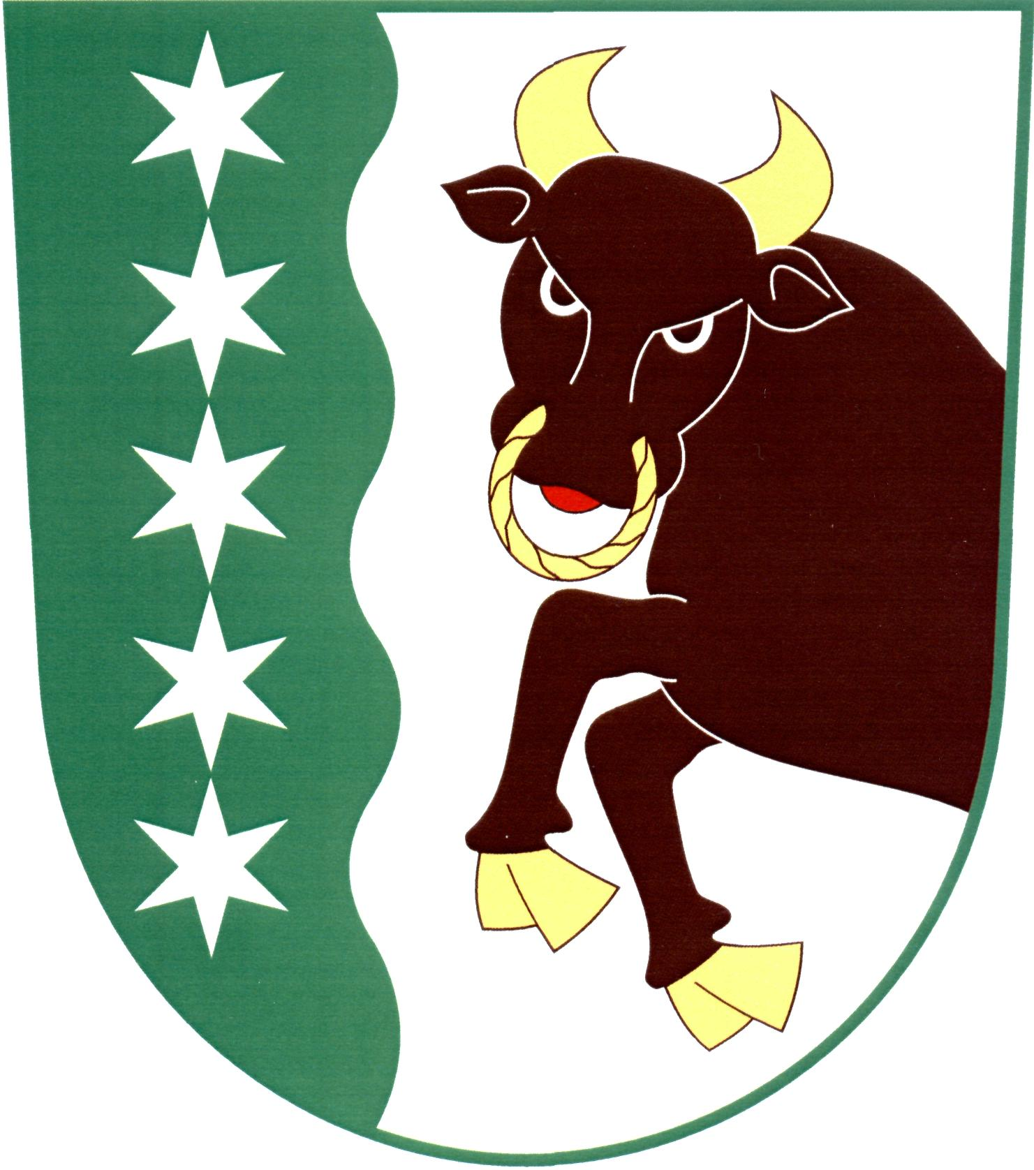 Znak obce Dřenice